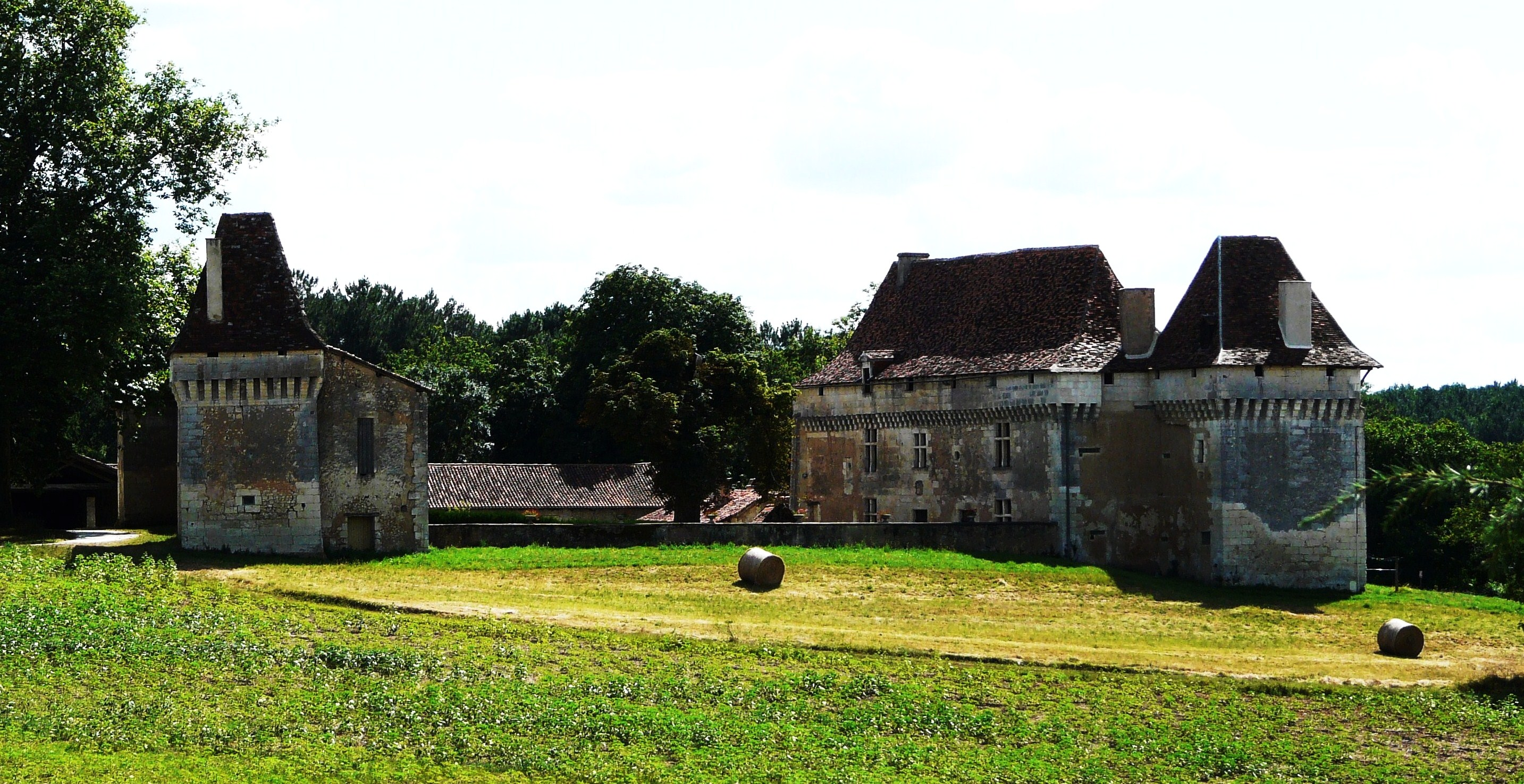 Le château de la Martinie, à l'entrée du bourg de Segonzac (Dordogne) Object location45° 12′ 08.3″ N, 0° 26′ 54.9″ E